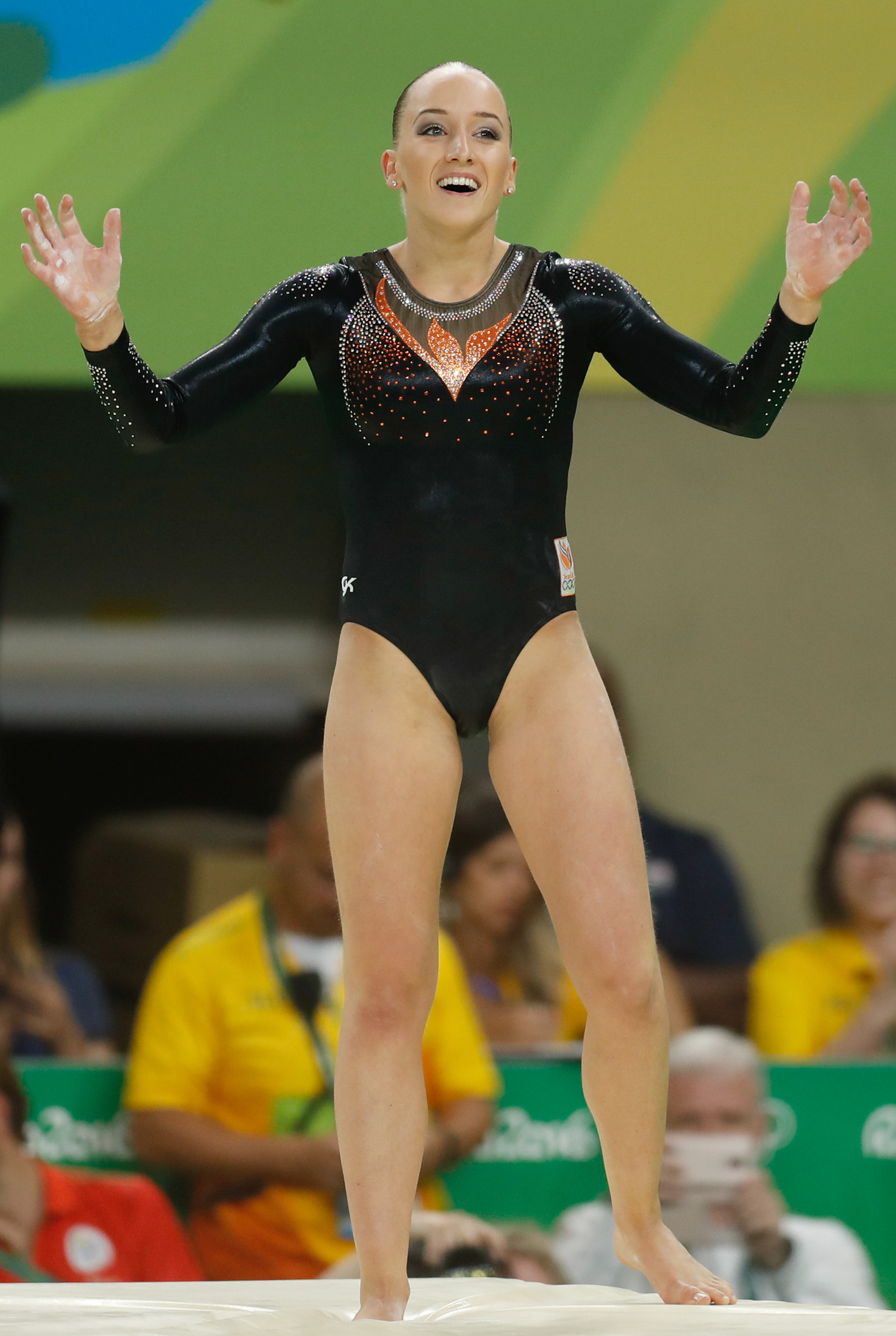 Rio de Janeiro - Ginasta da Holanda Sanne Wevers leva medalha de ouro ao vencer a prova final por aparelhos da trave (Fernando Frazão/Agência Brasil)